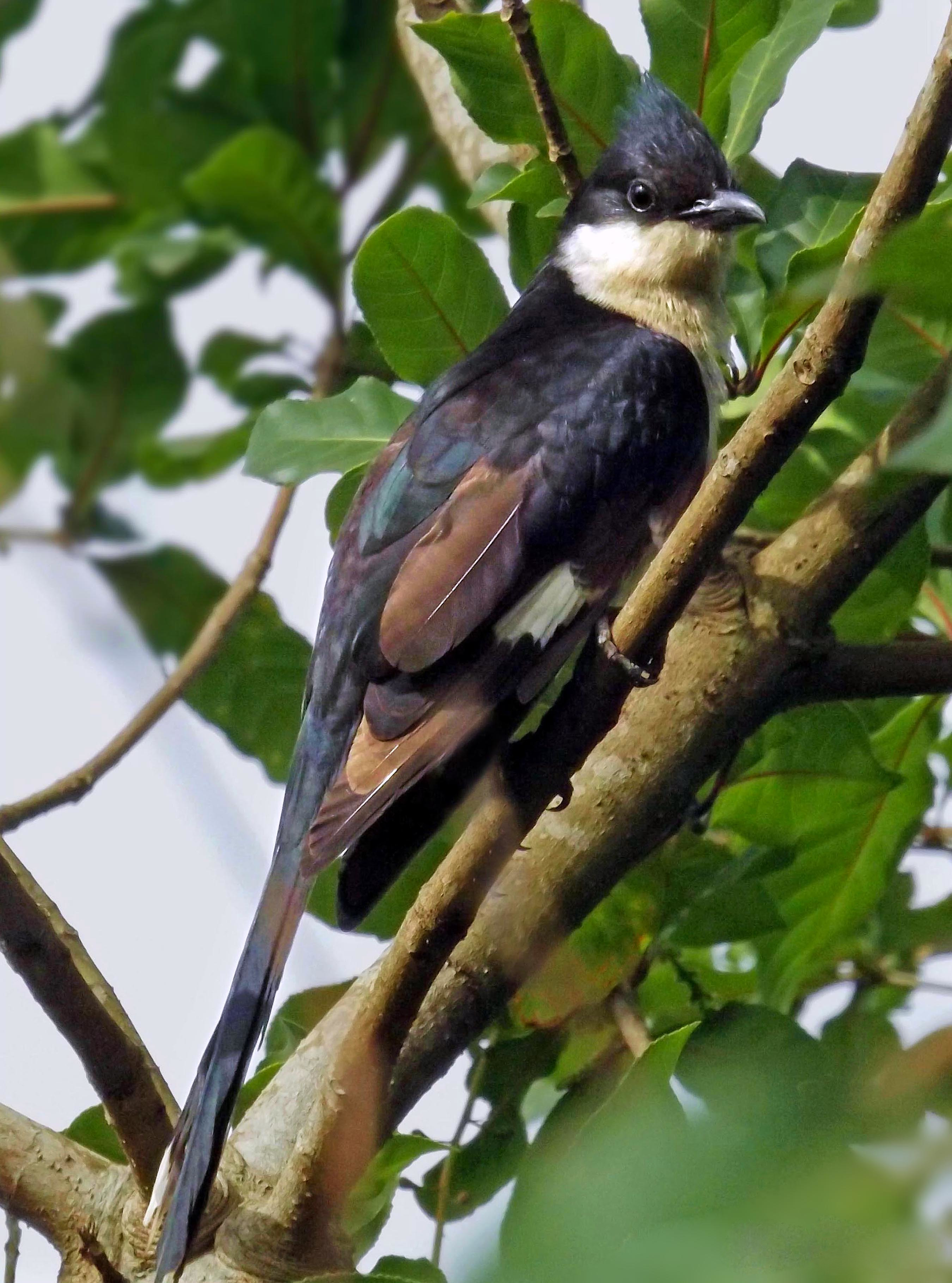 കൊമ്പൻ കുയിൽ